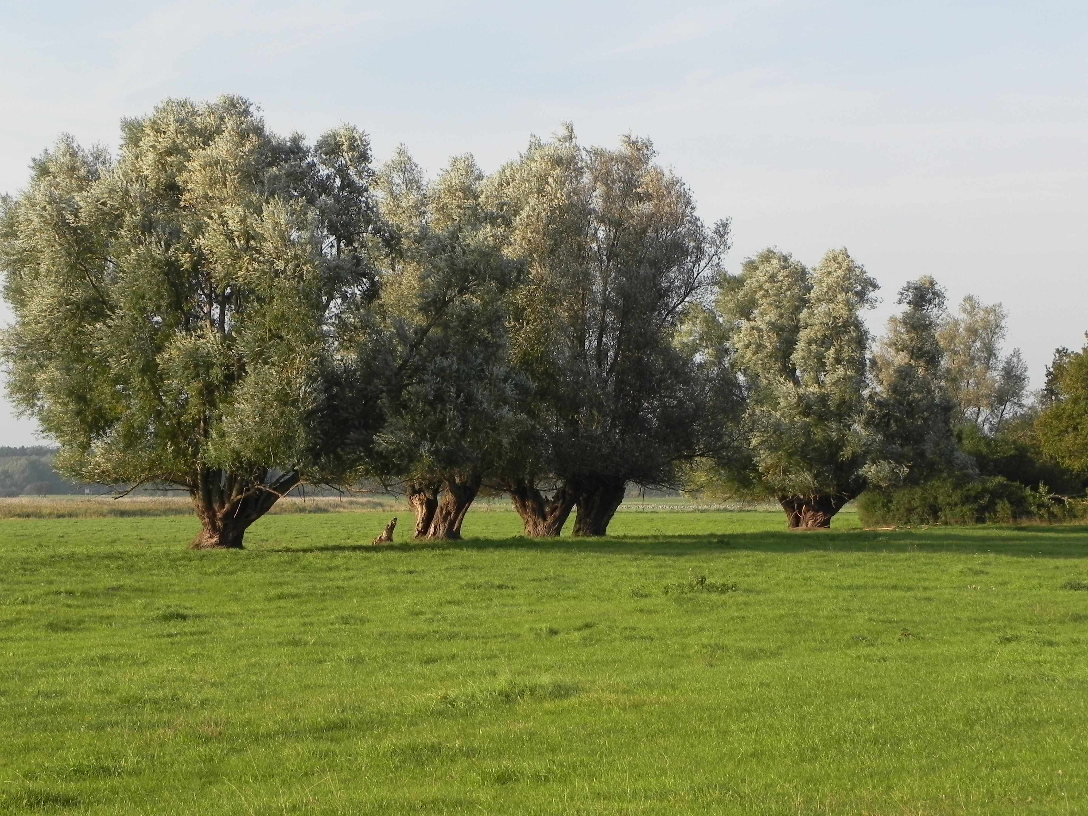 Alte Kopfweiden, jahrelang nicht mehr geschneitelt. Günzer Vogelwiesen, Nordvorpommern